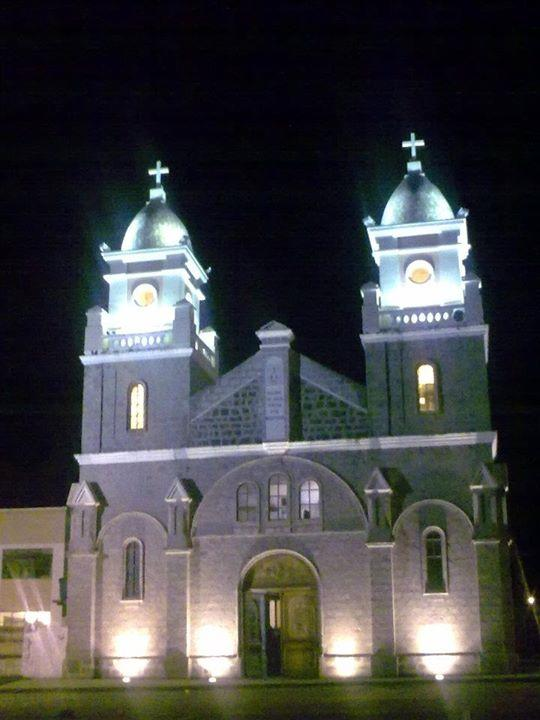 iglesia